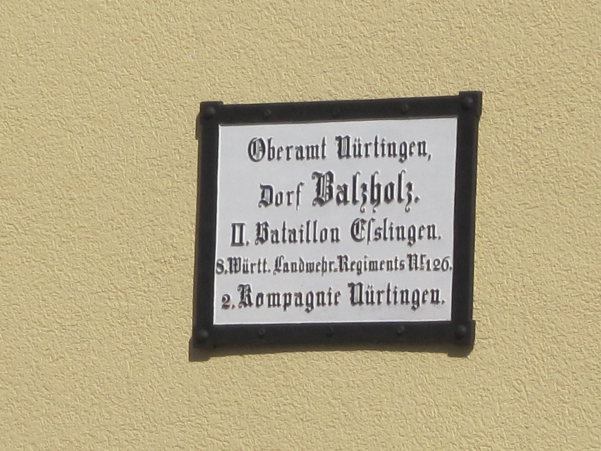 Inschrifttafel am Rathaus in Balzholz